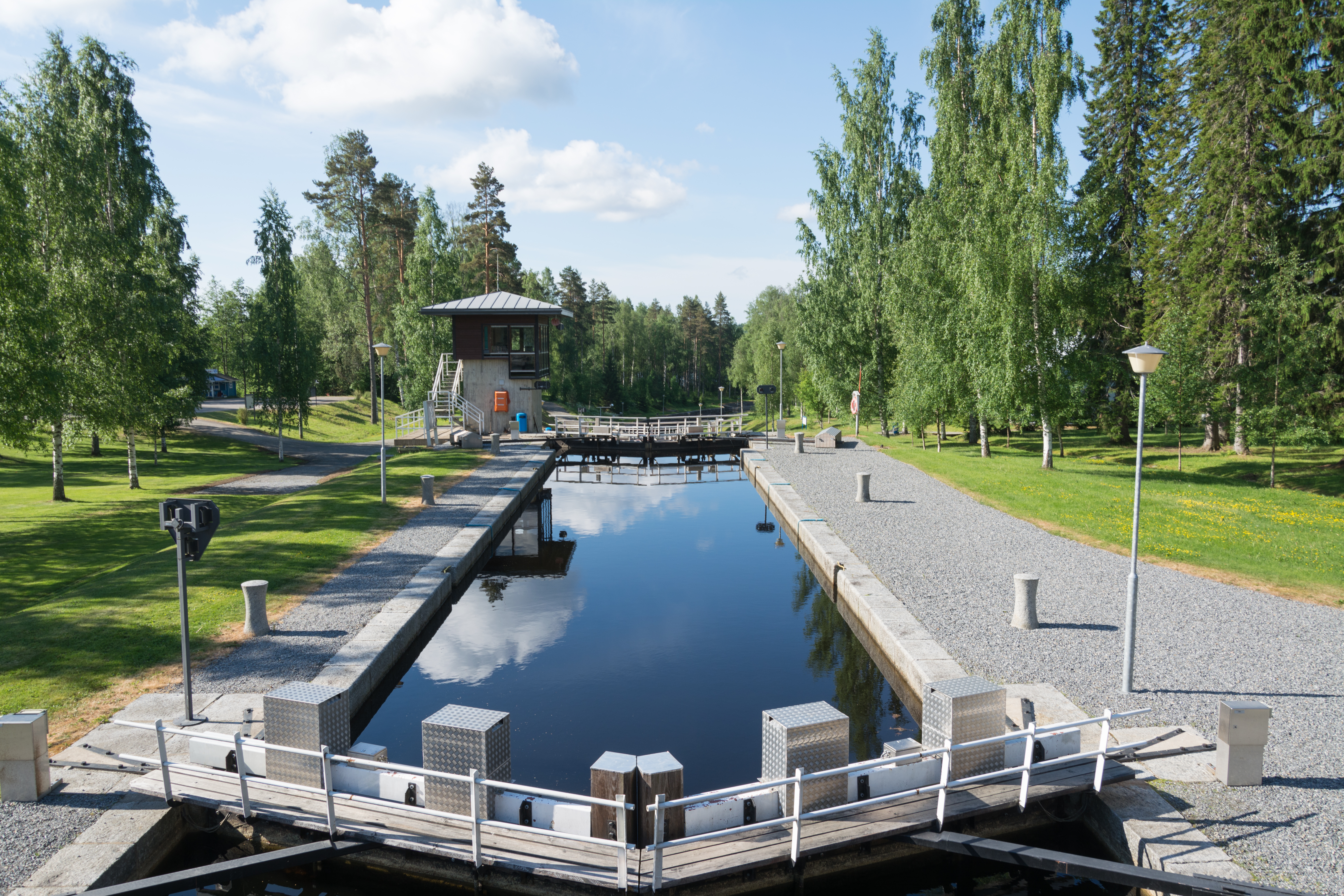 Varistaipaleen kanava Heinävedellä